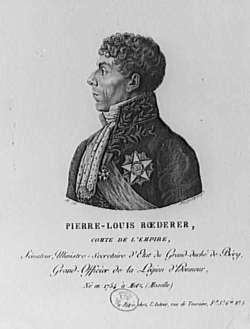 Portrait de Pierre Louis, comte Roederer (1754-1835), homme politique pendant la Révolution française.